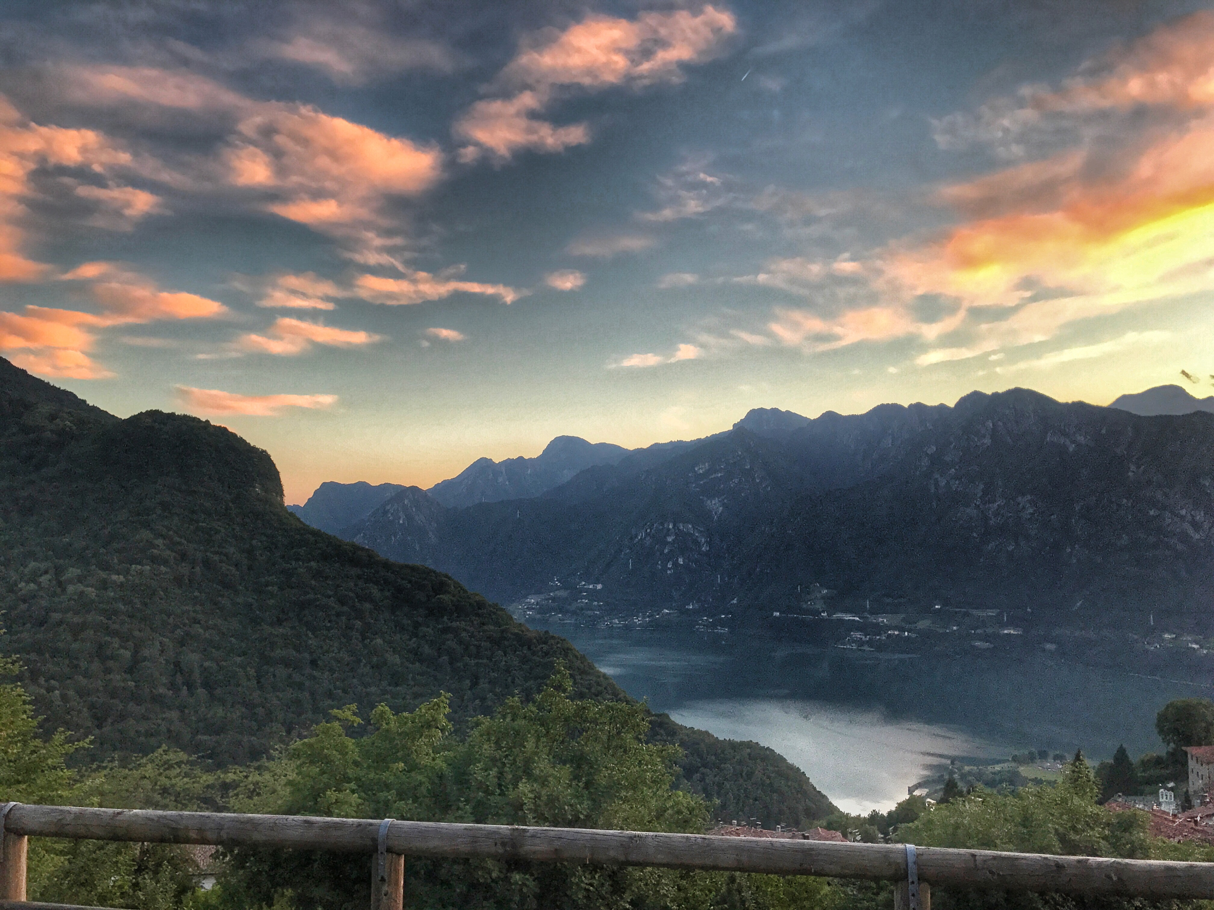 Bondone with a view: sunset among mountains and water